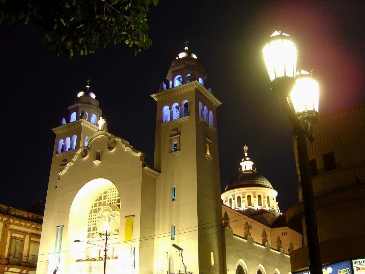 La Merced Church. San Miguel de Tucumán, Argentina.